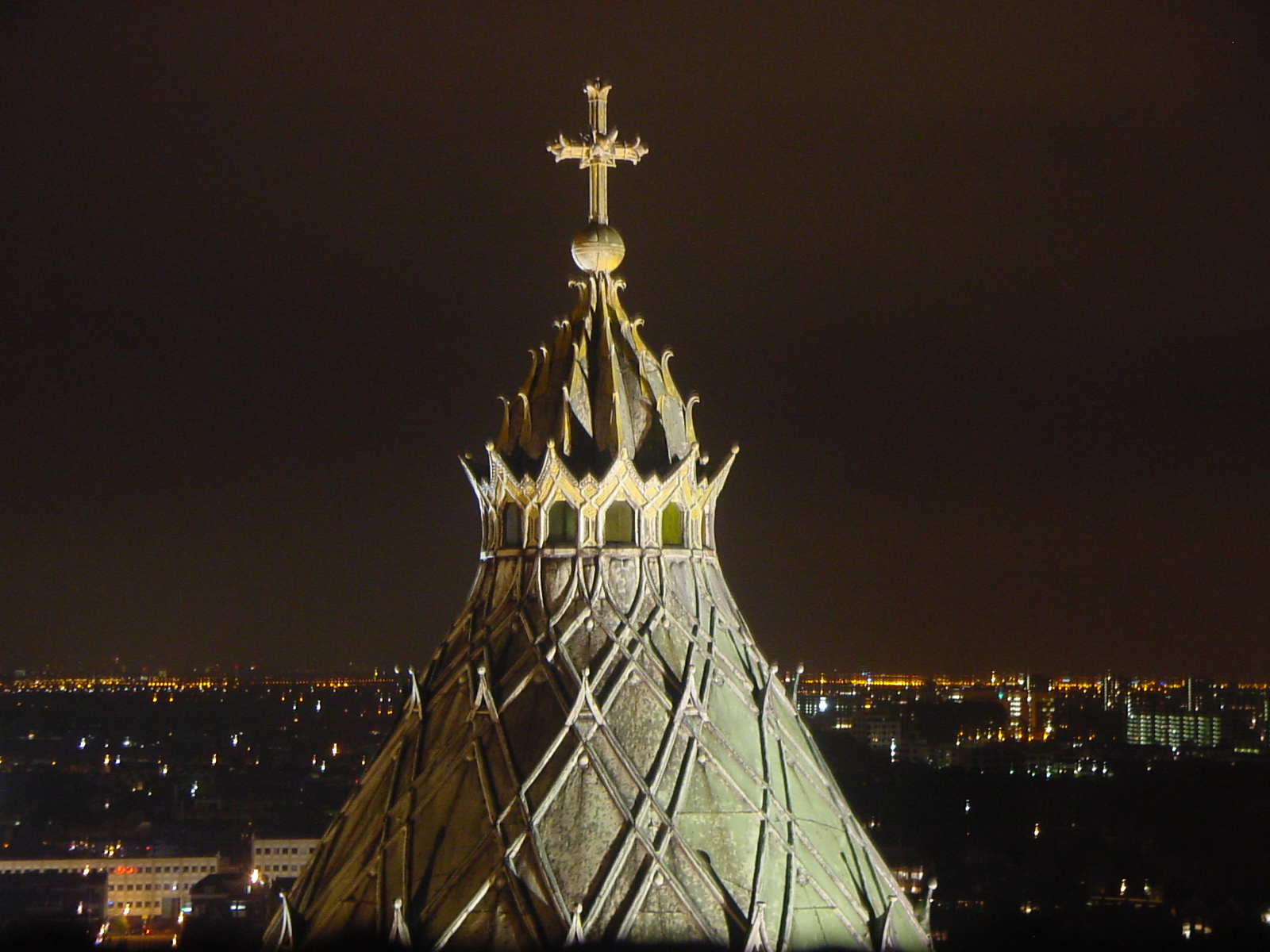 in 2010 genomen foto van de koepel van de kathedraal van Haarlem. De foto is genomen vanaf de noordelijke- of vrouwen-toren richting het westen. Linksonder is het provinciehuis aan het Houtplein zichtbaar, rechts de wijk Schalkwijk.